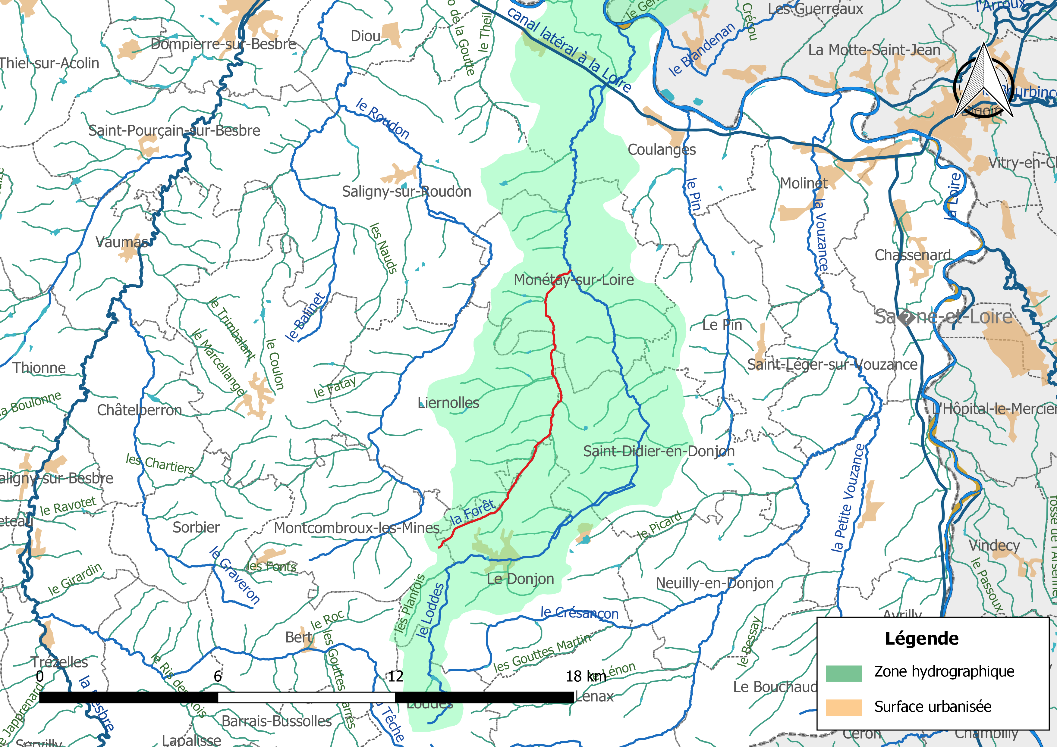 Carte du cours d'eau « la Forêt » (France) et de la zone hydrographique dans laquelle il s'insère.